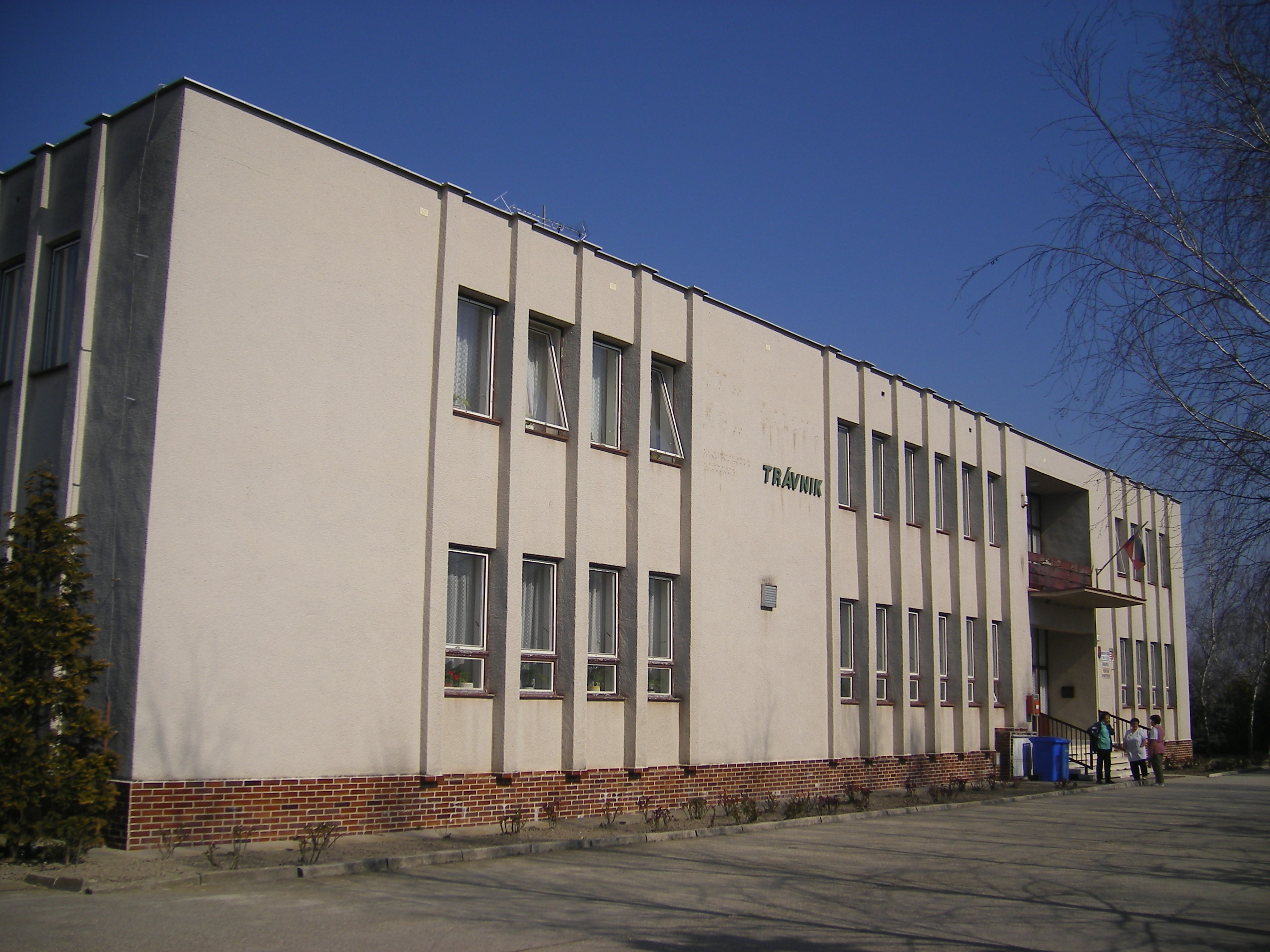 Komáromfüss - községi hivatal